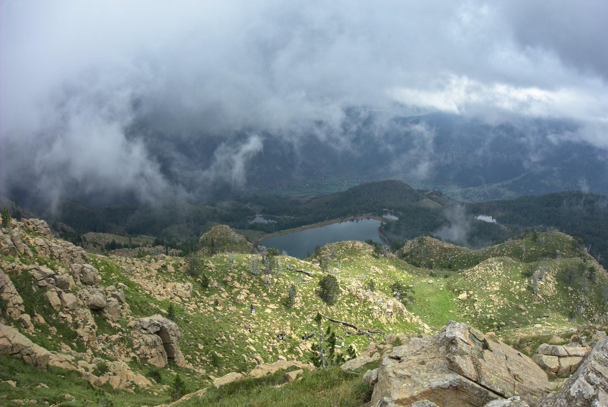 Lurë from top